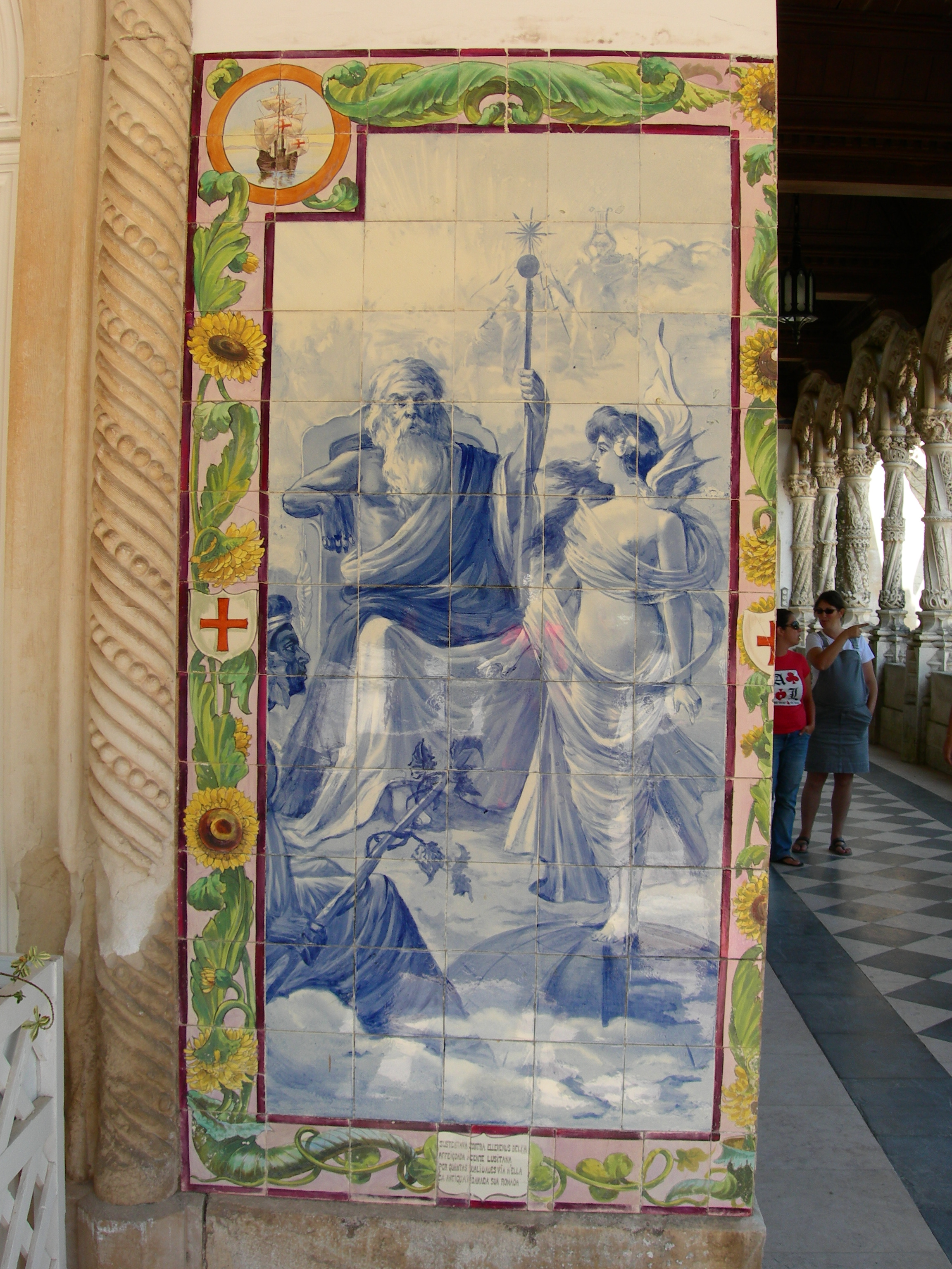 Palácio Hotel de Bussaco XVII This file was uploaded for Wiki Loves Monuments in Portugal with the unique identifier 74851.